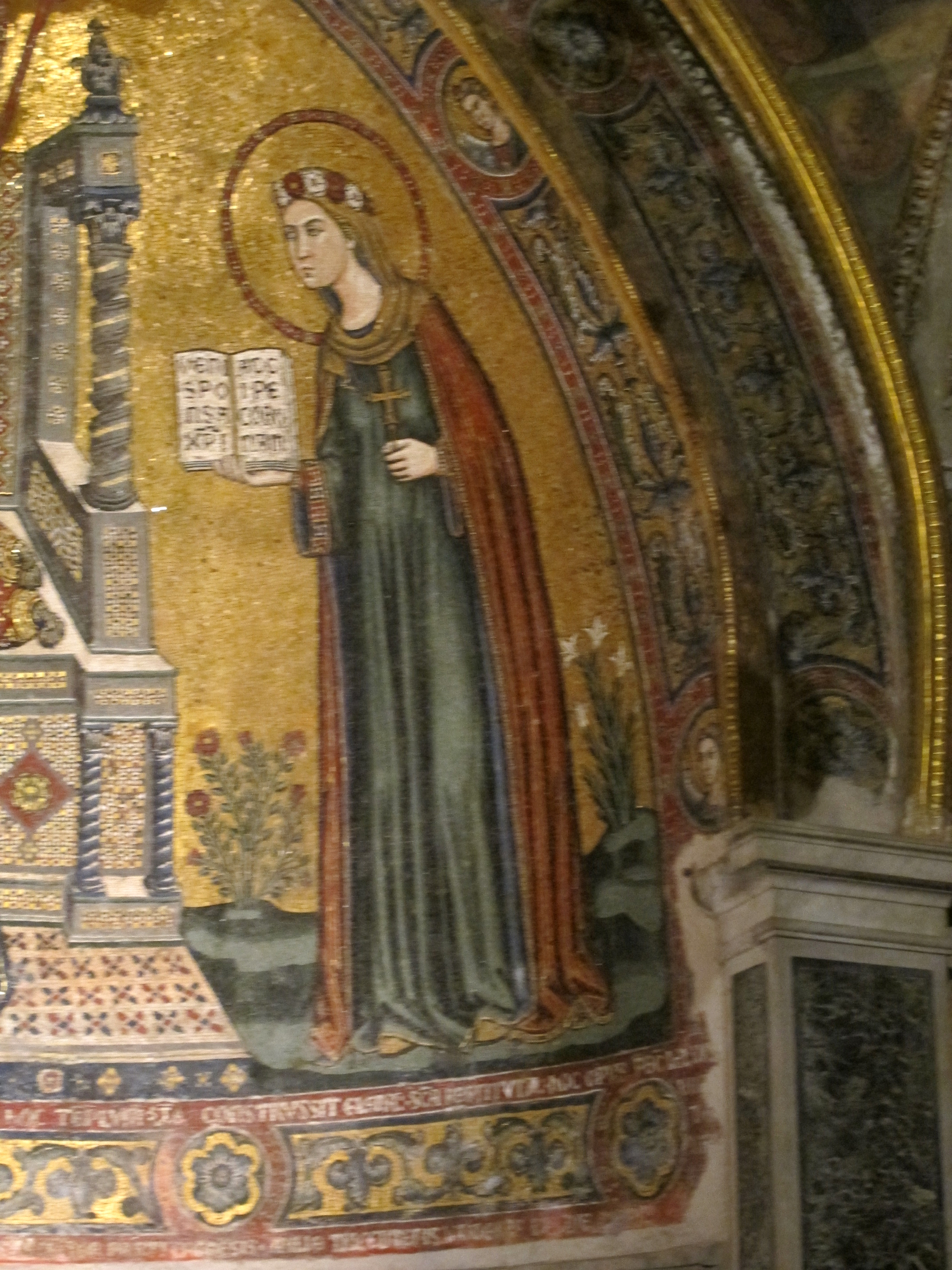 Duomo, Napoli